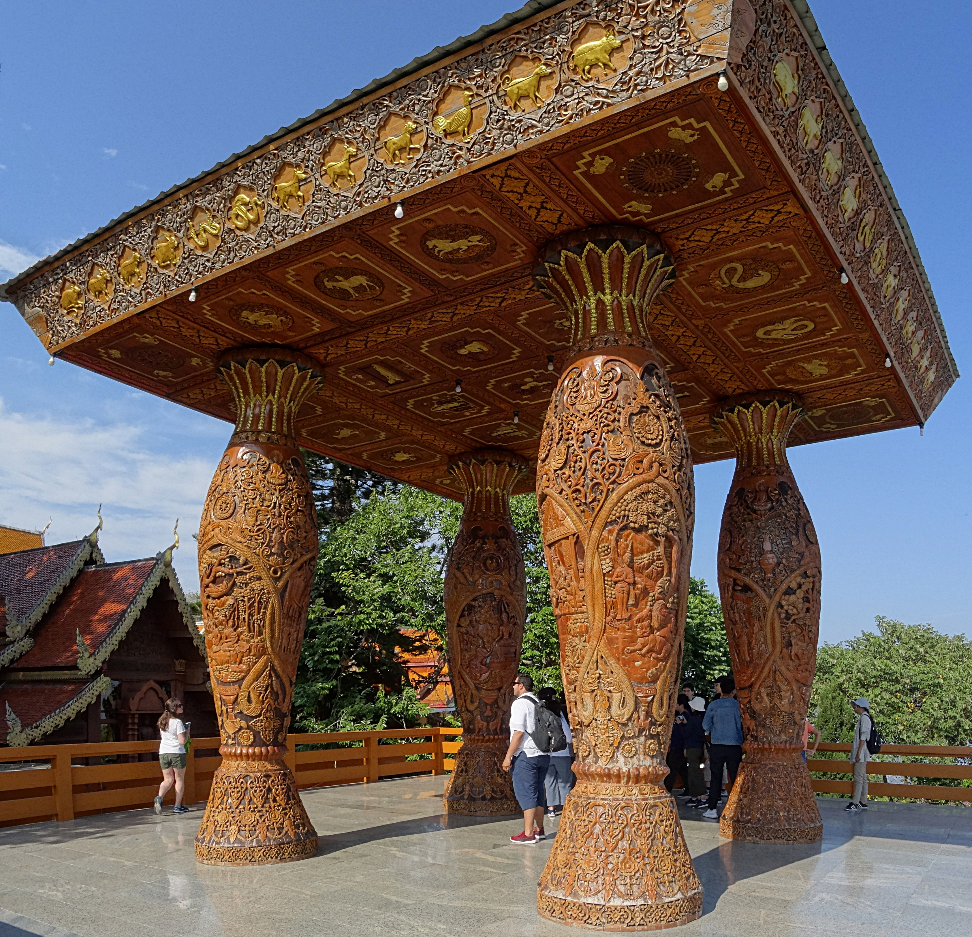 Baldachin am Bergtempel Wat Phra That Doi Suthep bei Chiang Mai